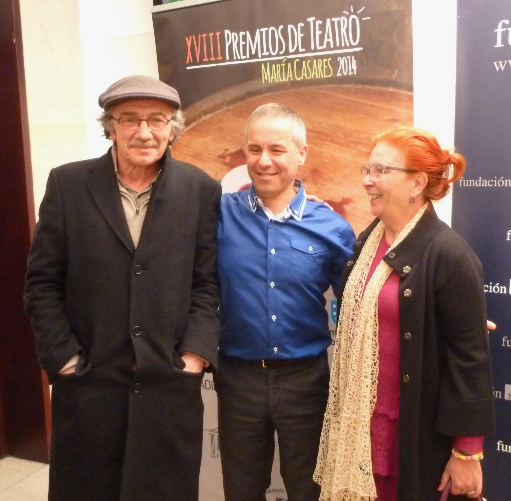 Gonzalo Uriarte, Avelino González na gala dos premios María Casares 2014.